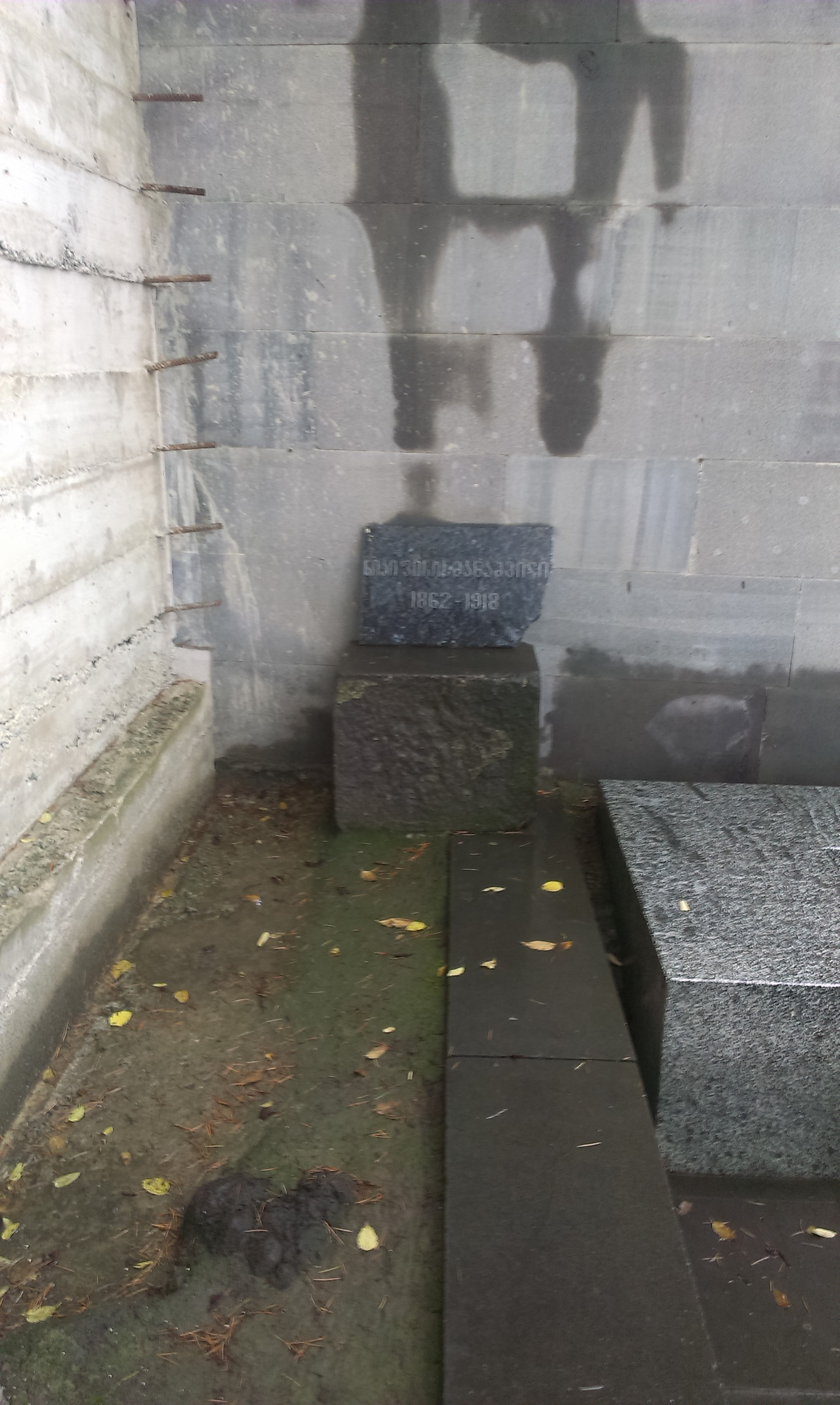 кенотаф Пиросмани